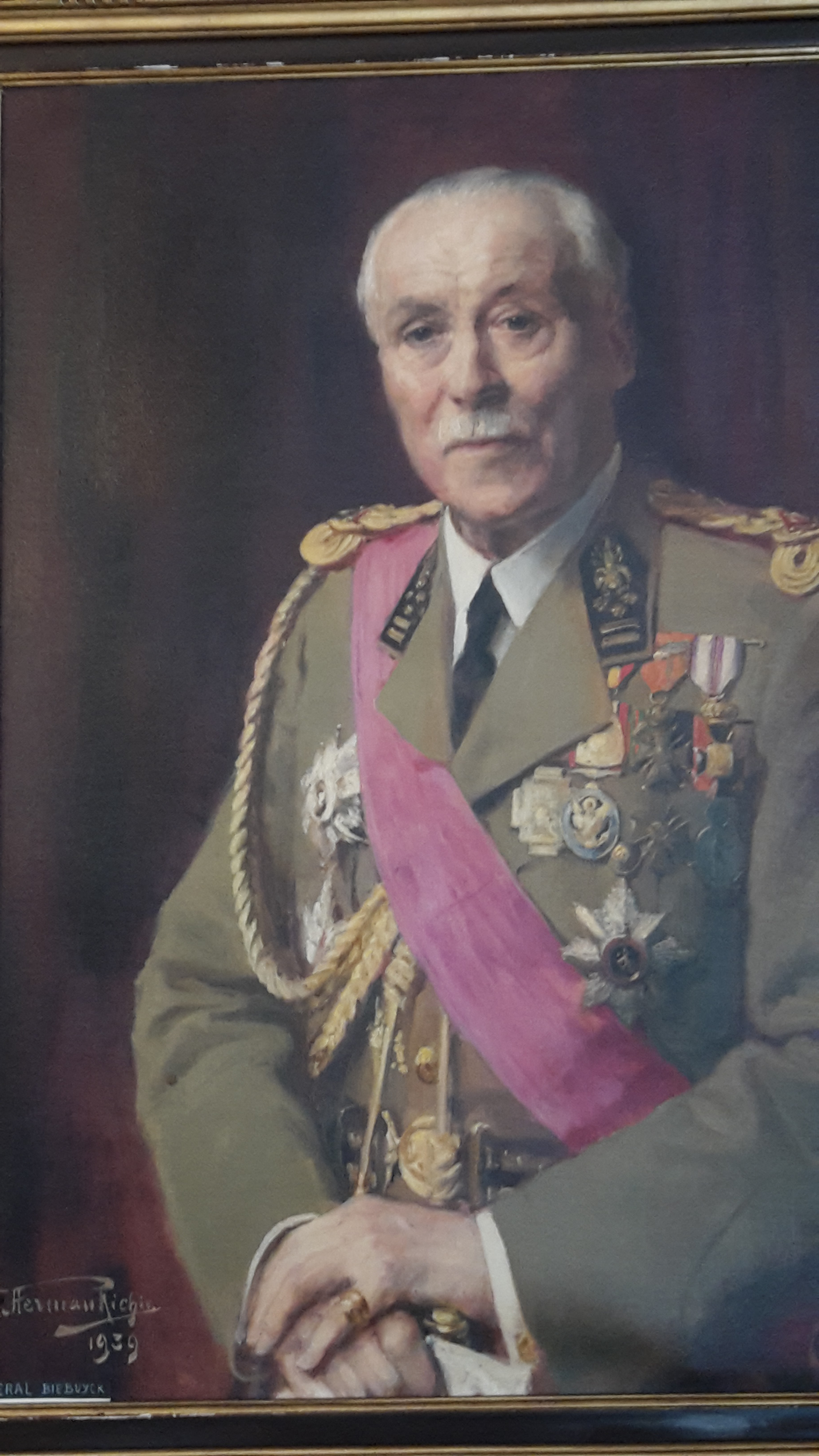 Aloïs Biebuyck (1860-1944)